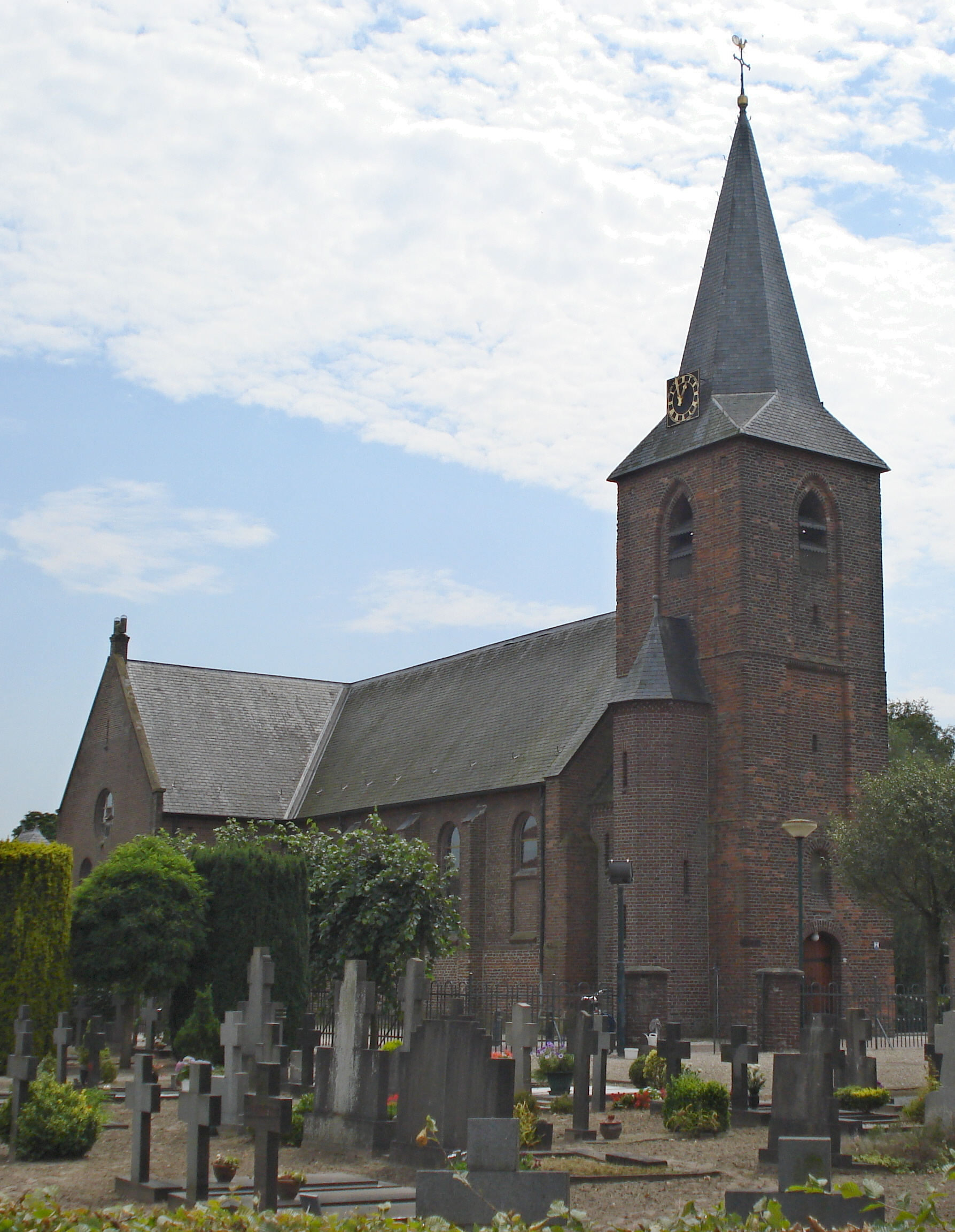 Sint Hubert, gotische kerk Sint Hubertus, 15e eeuw.